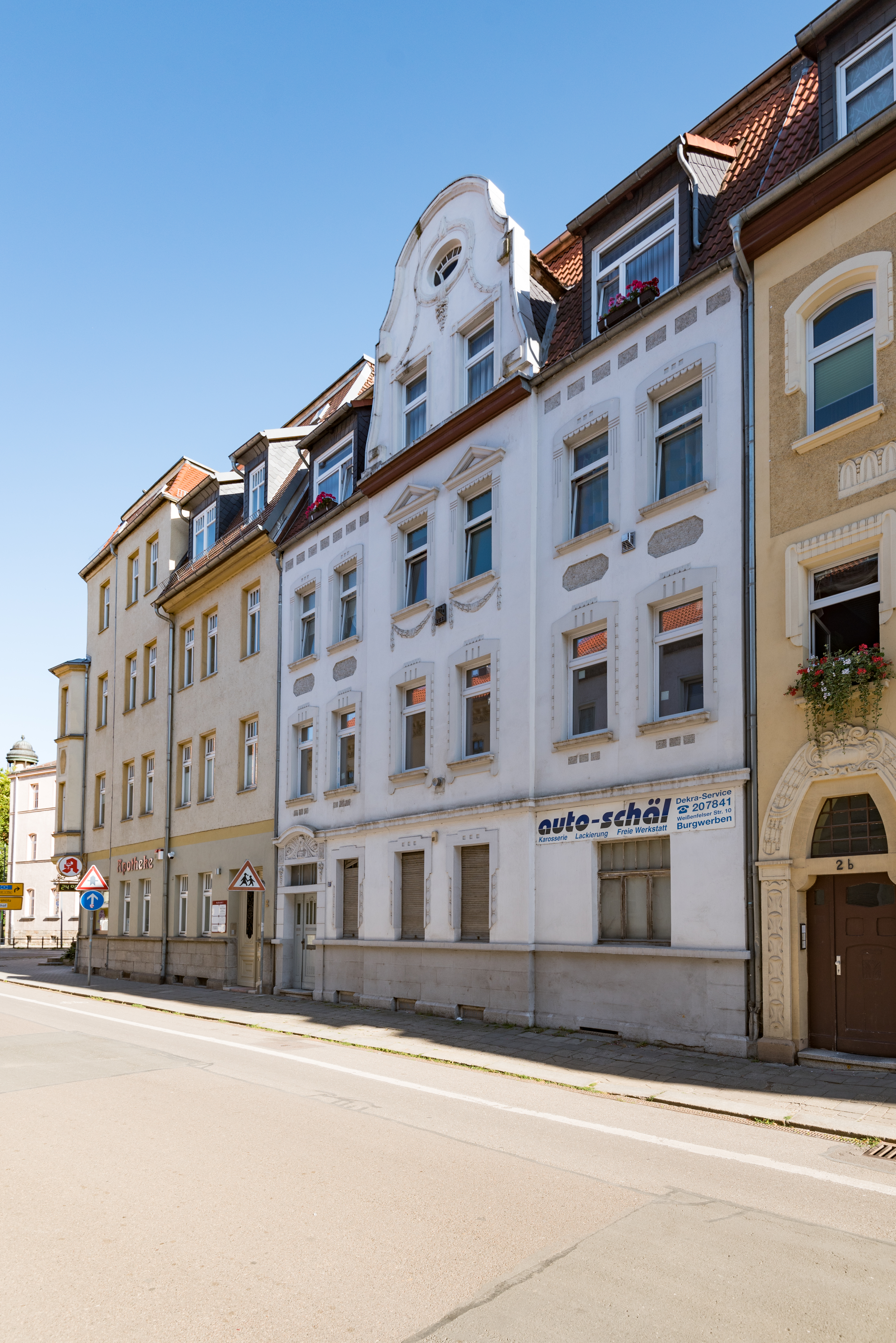 Weißenfels, Beuditzstraße 2a